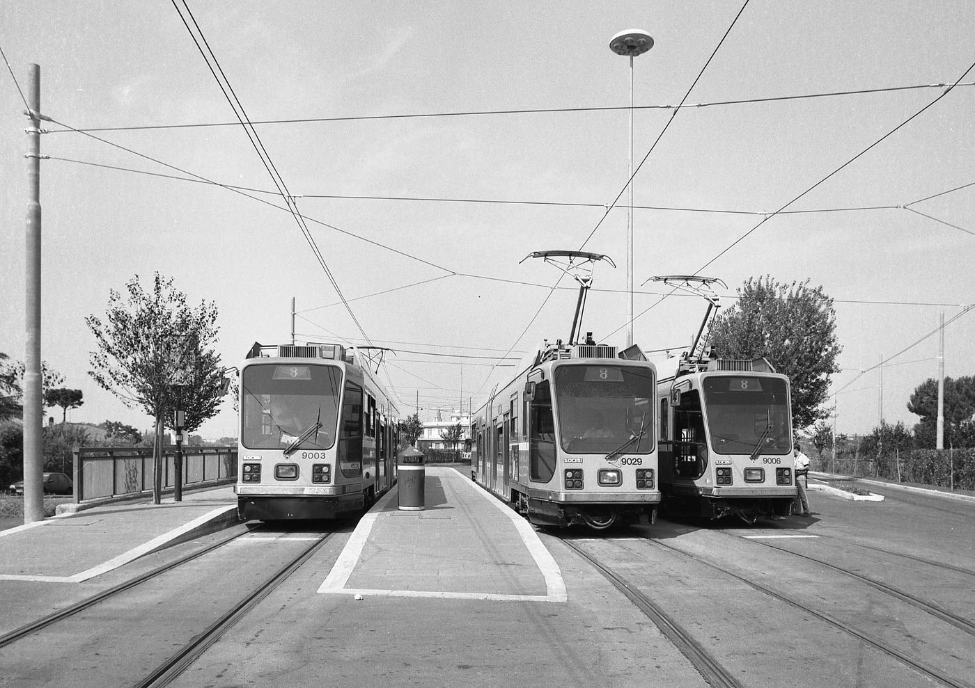 Capolinea Casaletto linea tram 8